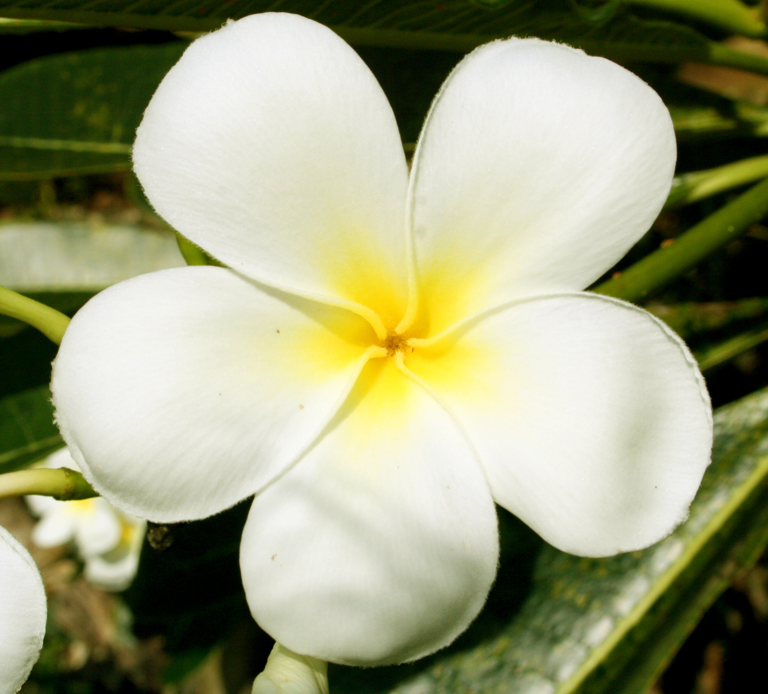 5-blättrige Blüte einer Frangipani (Plumeria alba), ein Tempelbaum im Tempel Wat Pho in Bangkok, diese wird wegen ihres Duftes und ihrer einfachen Schönheit gerne als Opferblume verwendet.